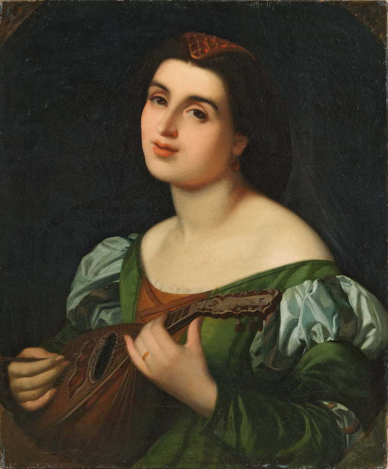 Suonatore di liuto